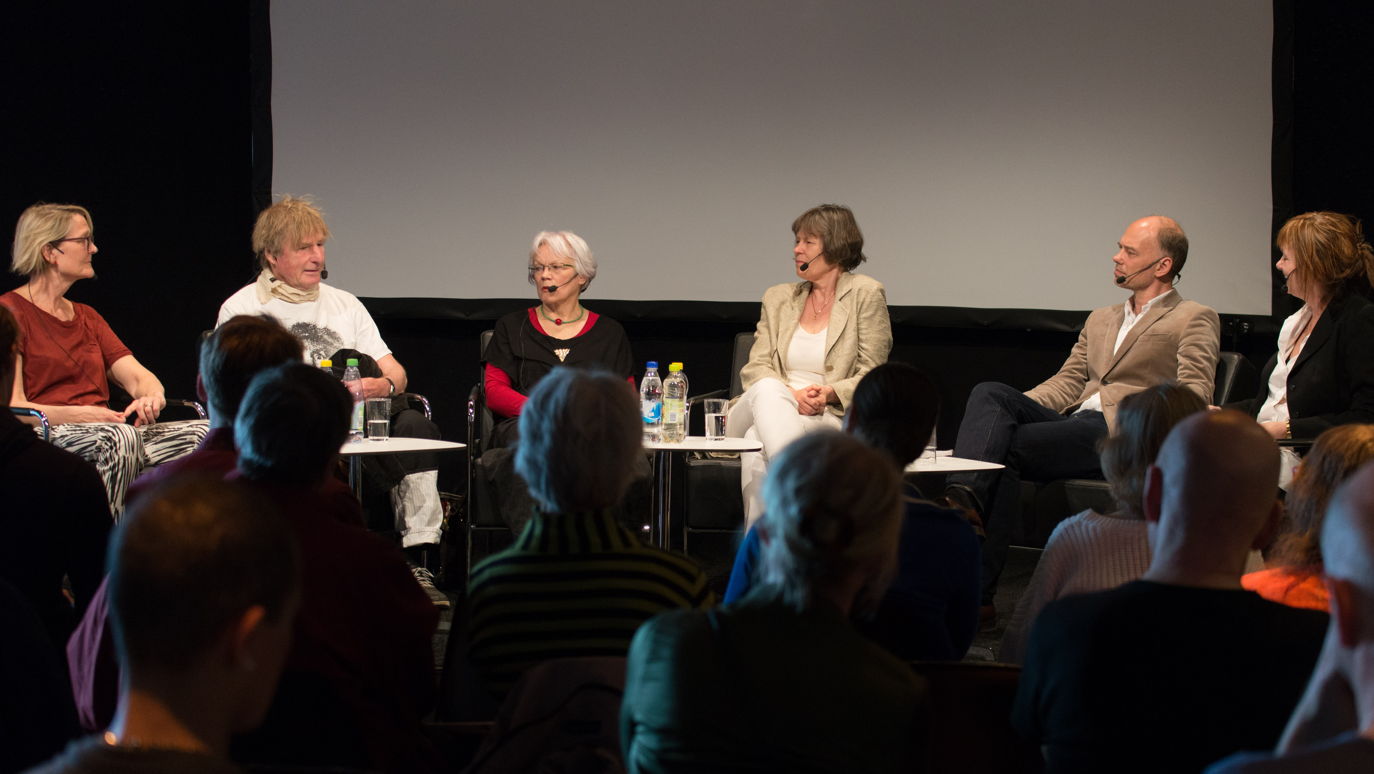 Gannevik Talks på Kulturhuset i Stockholm den 24 maj 2015.